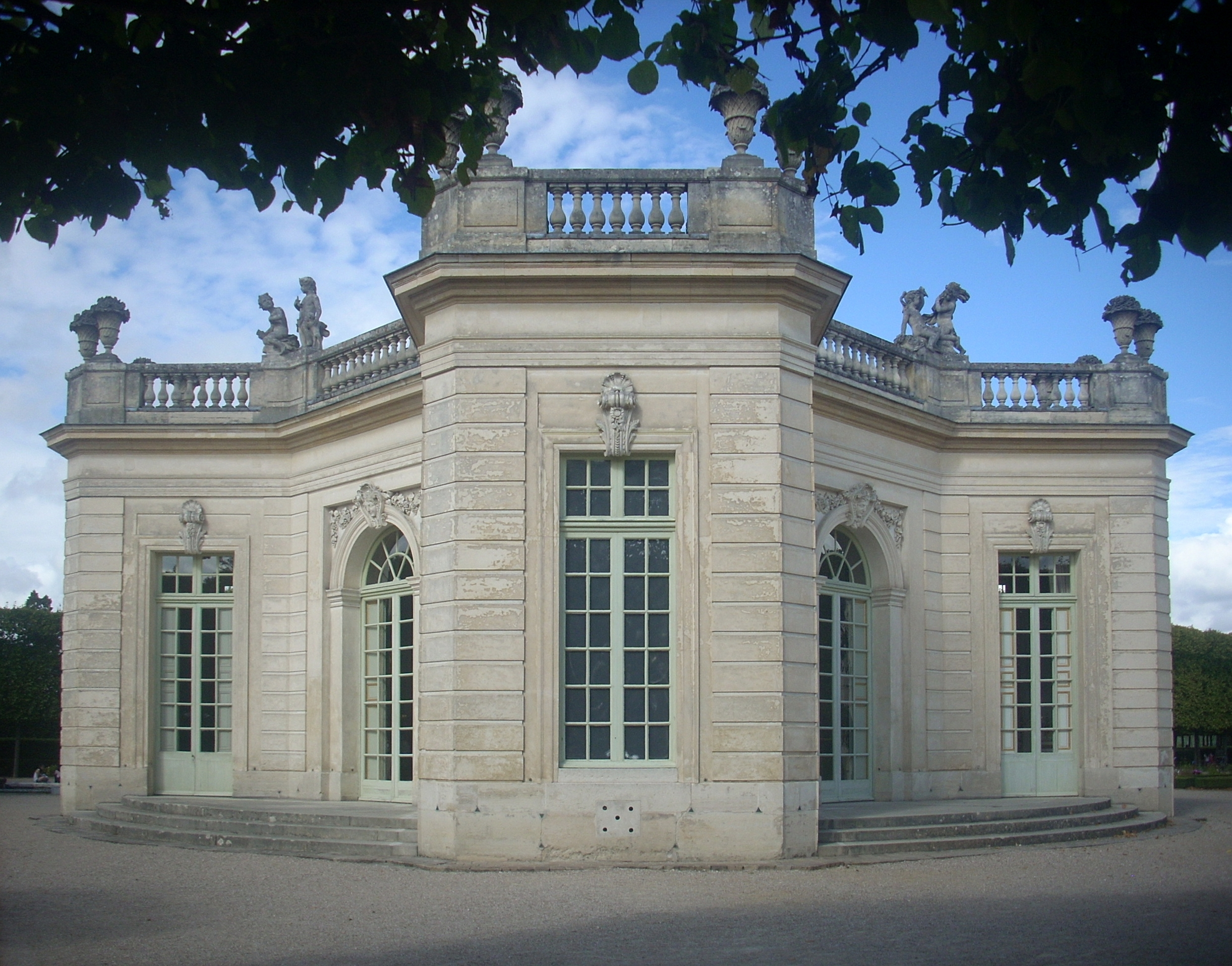 Jacques-Ange Gabriel (1698-1792): Pavillon Français dans les Jardins du Petit Trianon à Versailles